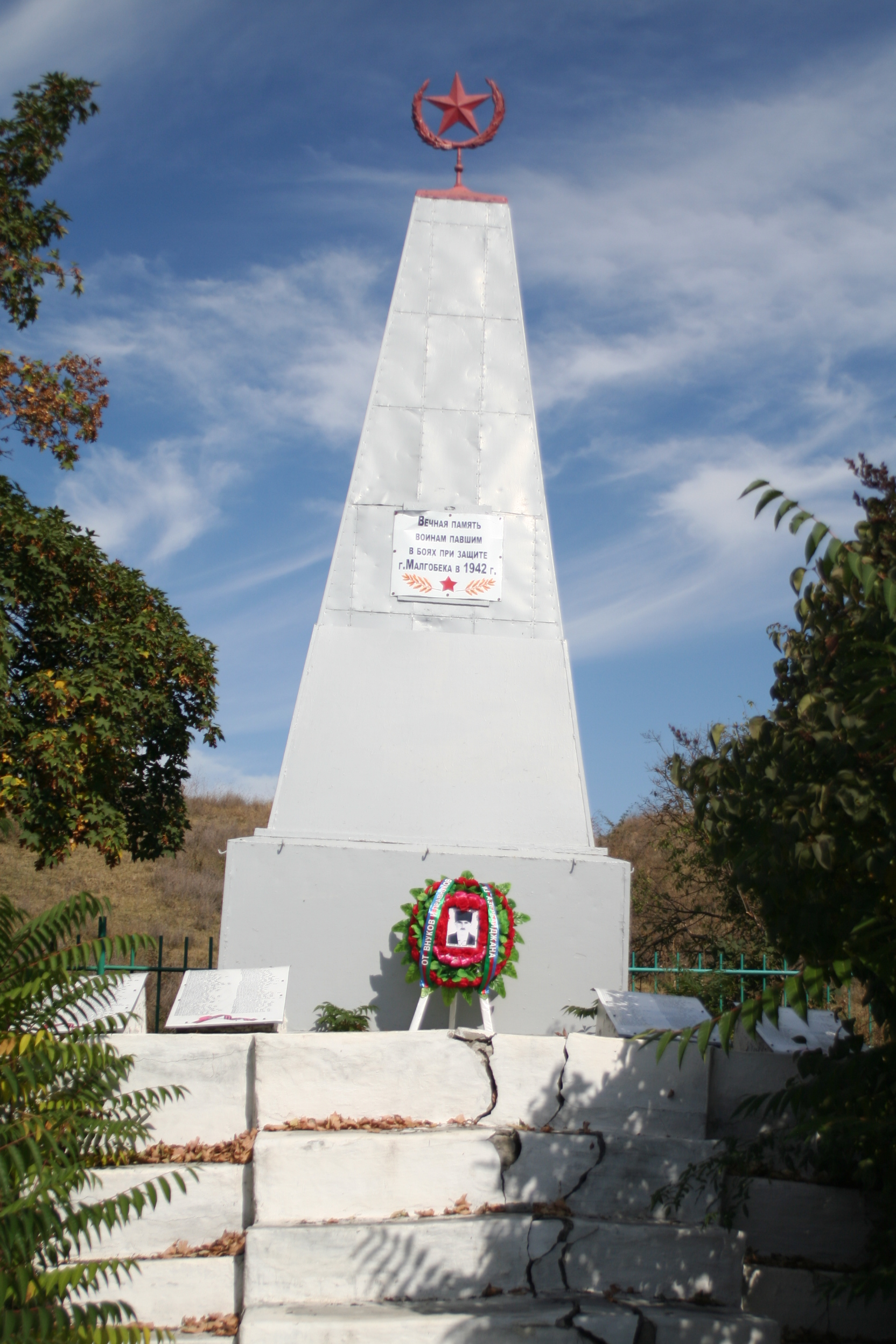 Братская могила советских воинов, погибших в годы ВОВ 1941-45 гг.: у кирпичного завода, Малгобек, Ингушетия